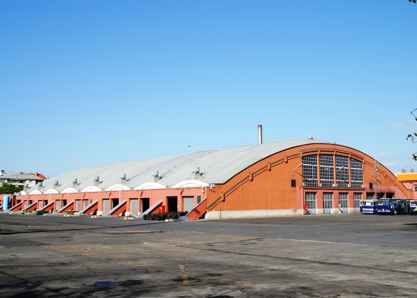 Autóbuszgarázs (Budapest 11, Hamzsabégi út 23.) This is a photo of a monument in Hungary. Identifier: 1102